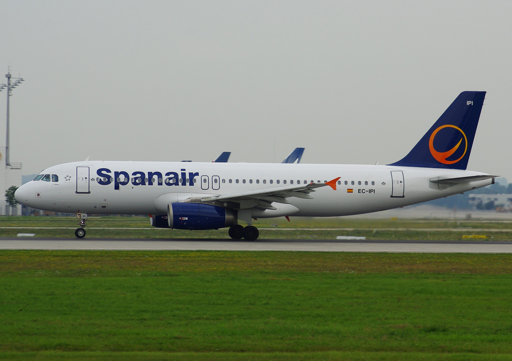 Es un nuevo modelo de un avión de Spanair